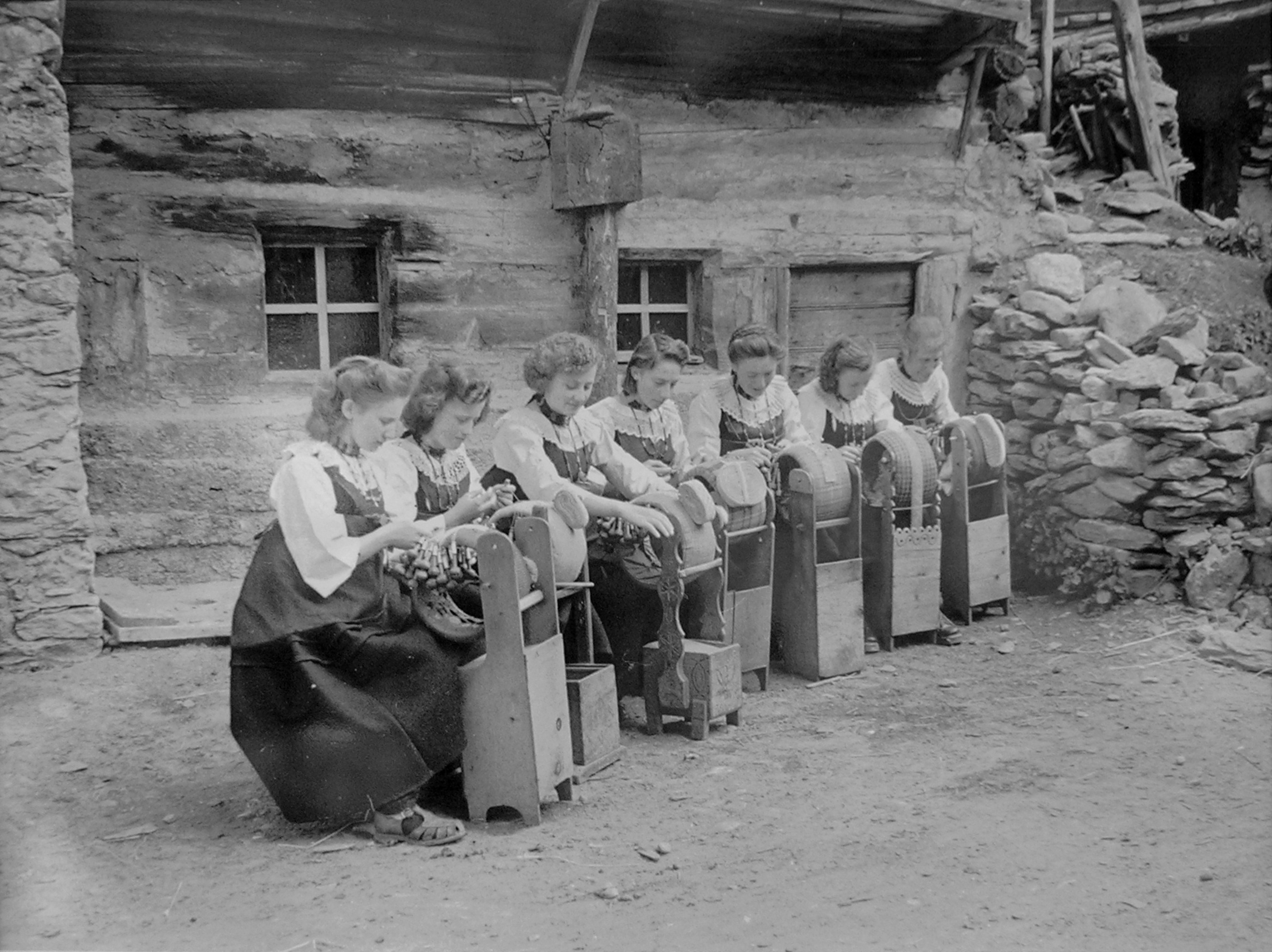 Dentelles di Cogne in una foto d'epoca, Cogne, Valle d'Aosta, Italia.